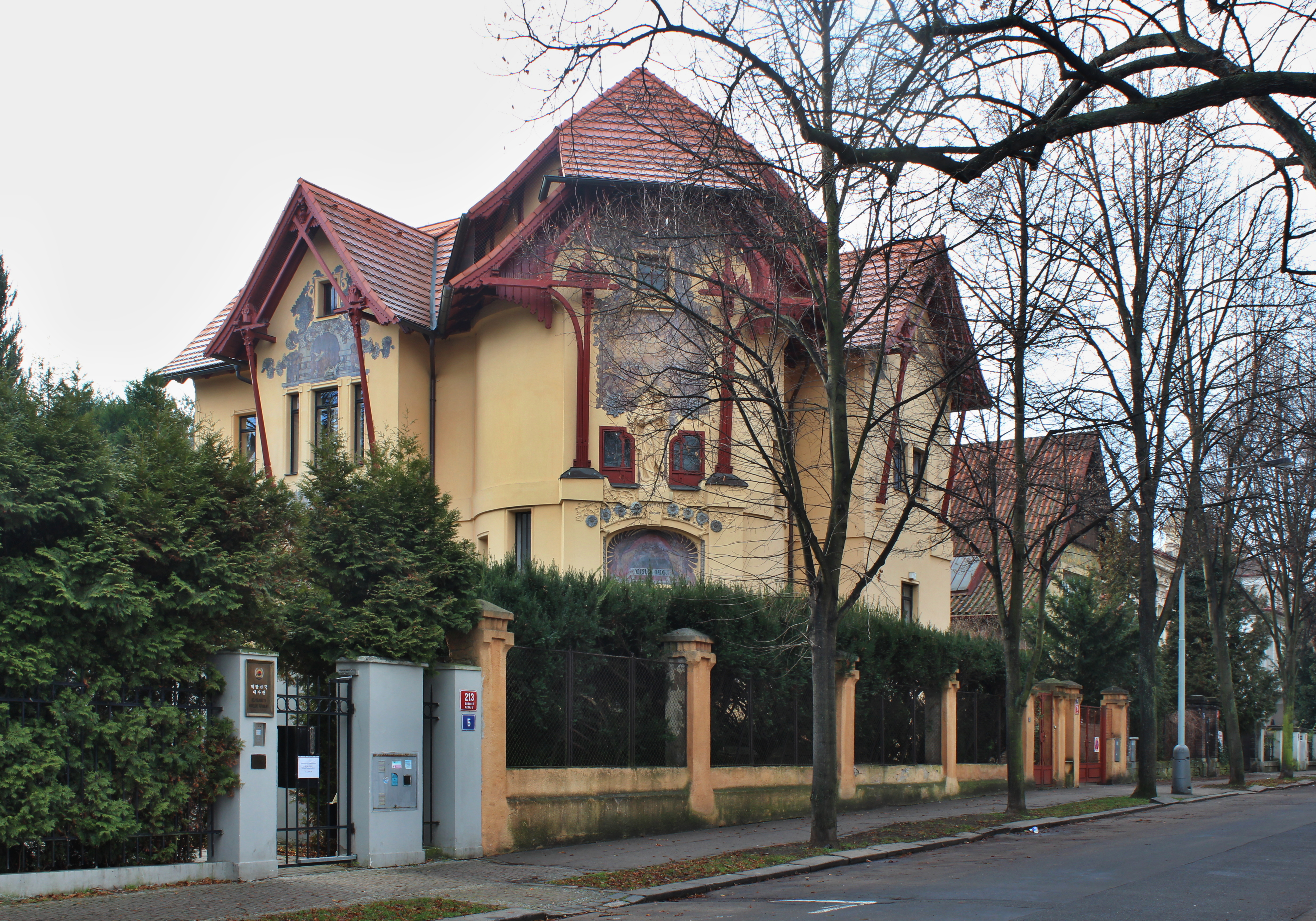 Maškova vila, 1901, spoluautoři: Bohumil Waigant, Antonín Waigant, Luděk Wurzl, Slavíčkova čp. 196/7, Praha 6 – Bubeneč